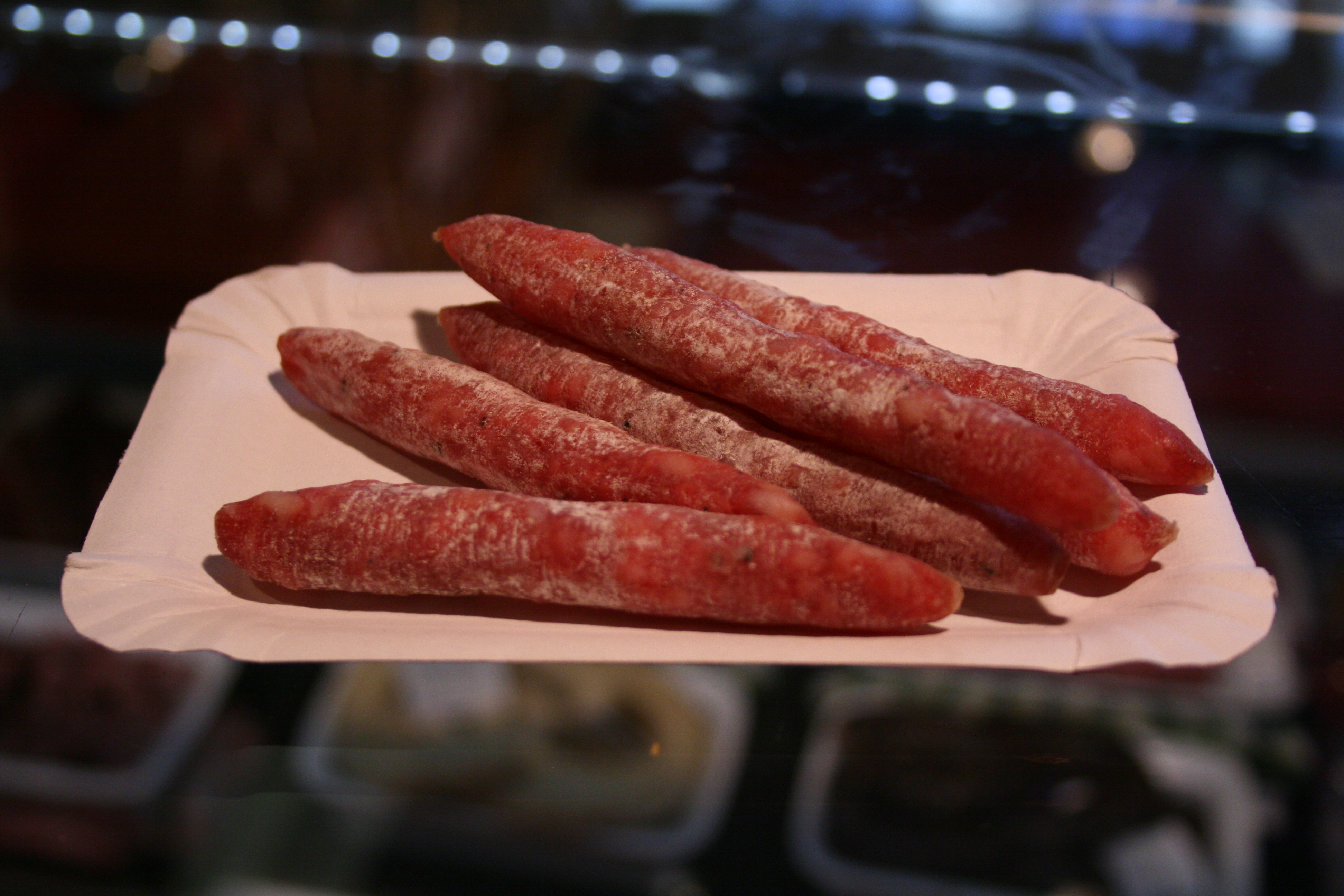 Fuet, aus Katalonien stammende dünne, luftgetrocknete Hart- bzw. Dauerwurst